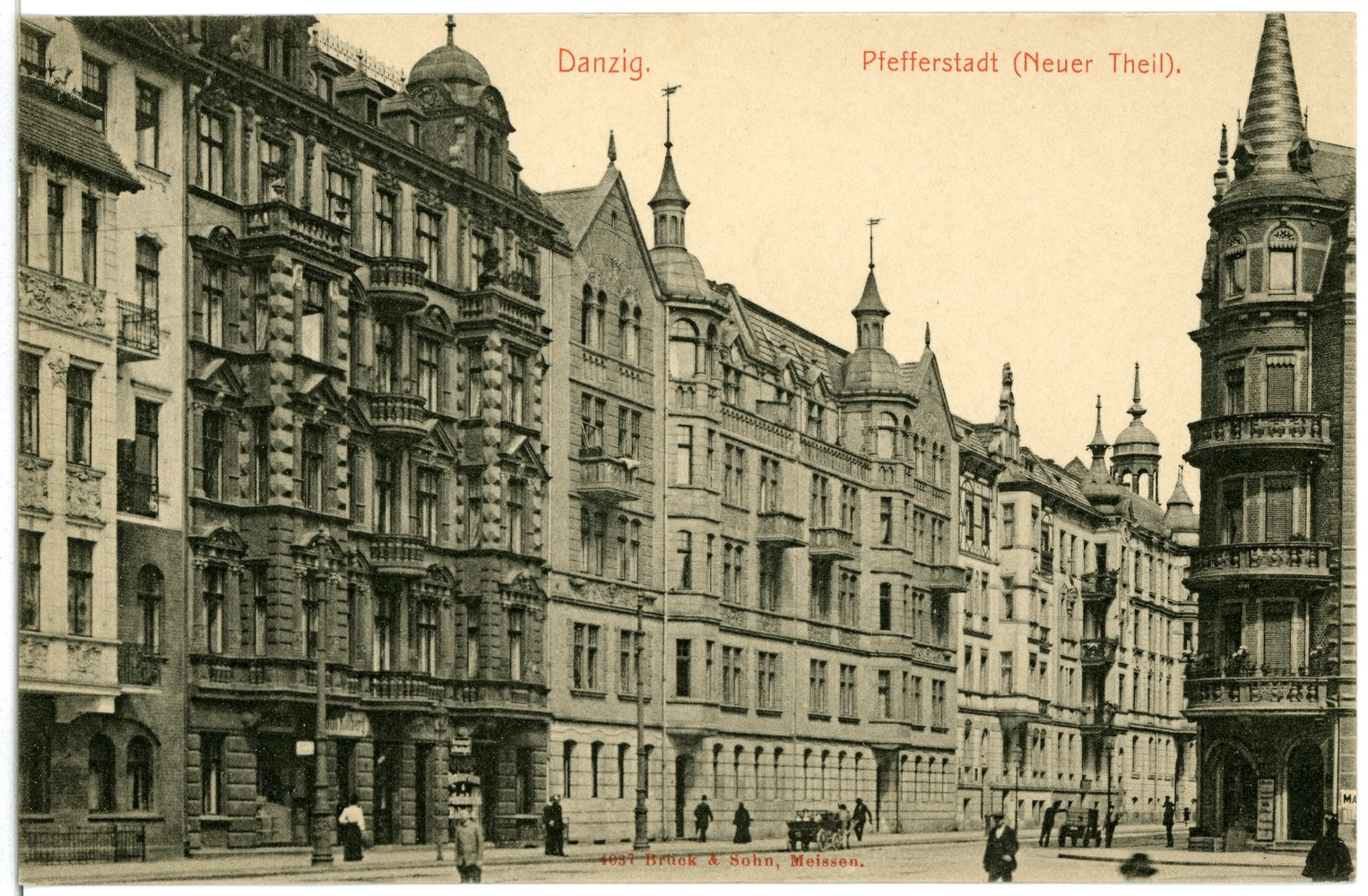 Danzig; Pfefferstadt This postcard is from publisher Brück & Sohn in Meißen ( This postcard has a unique number 04037 and is available in a higher resolution at the publisher. This images was uploaded in a cooperation project between Wikipedians and the publisher.